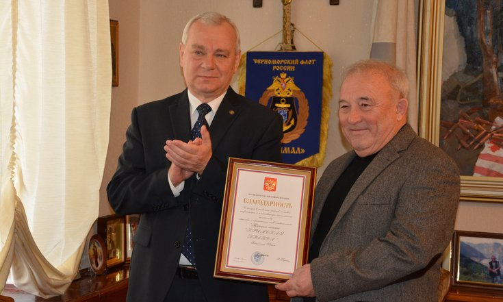 Церемония вручения коллективу газеты «Крымская правда» Благодарности Президента Российской Федерации. Слева - заместитель полномочного представителя Президента Российской Федерации в Крымском федеральном округе Николай Водорезов, справа - главный редактор газеты «Крымская правда» Михаил Бахарев.